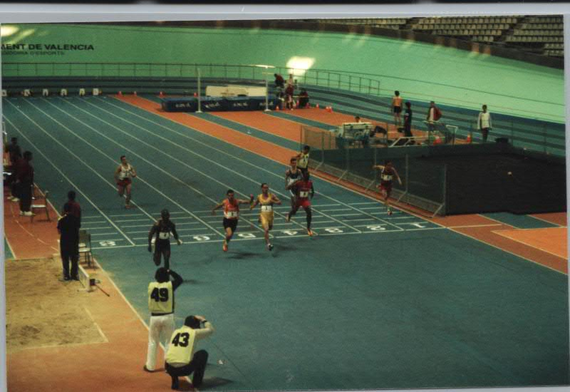 60 metres